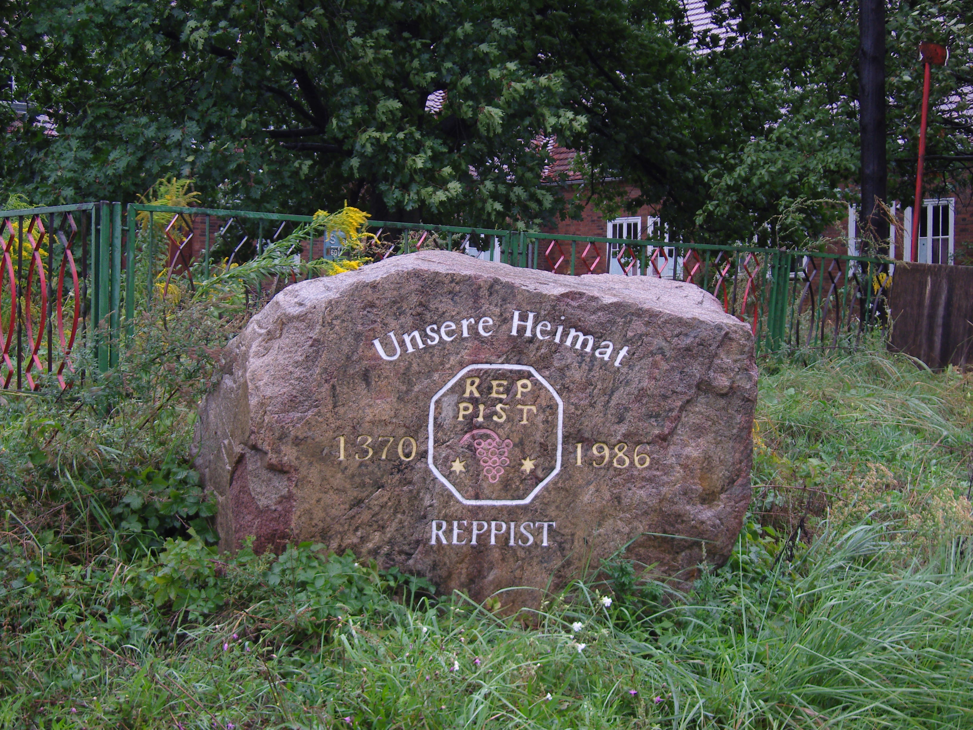 Gedenkstein für den durch den Tagebau devastierten Ort Reppist bei Senftenberg